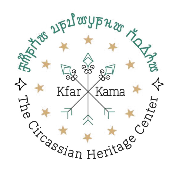 הסמל החדש של המרכז למורשת הצ'רקסית